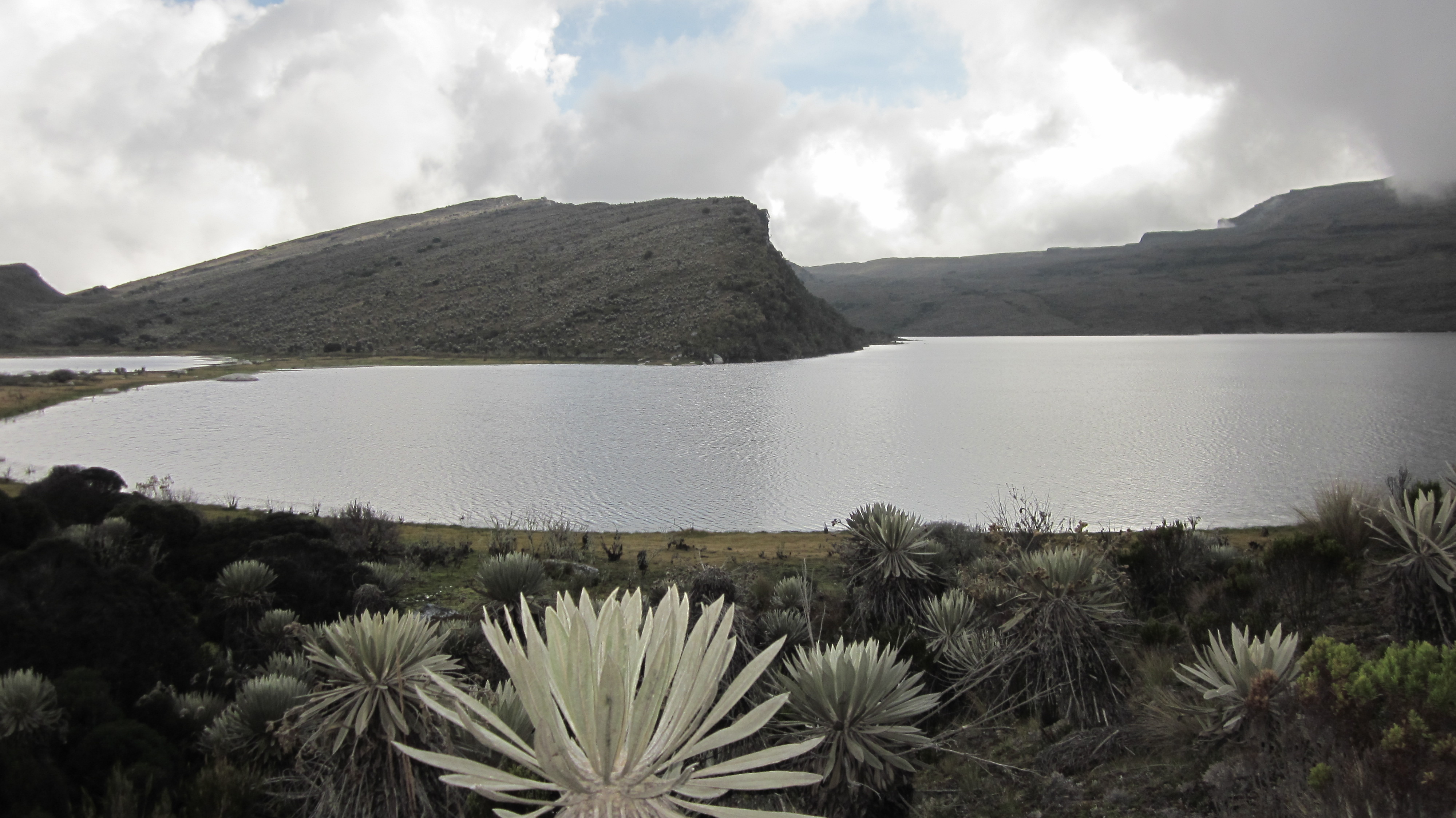 La Laguna de Chisacá es un cuerpo de agua ubicado a unos 3600 metros sobre el nivel del mar. Hace parte del Parque Natural Nacional de Sumapaz, en el que se puede apreciar la vegetación y fauna de páramo. En ella nace el Río Tunjuelito. También es llamada Laguna de los Tunjos.